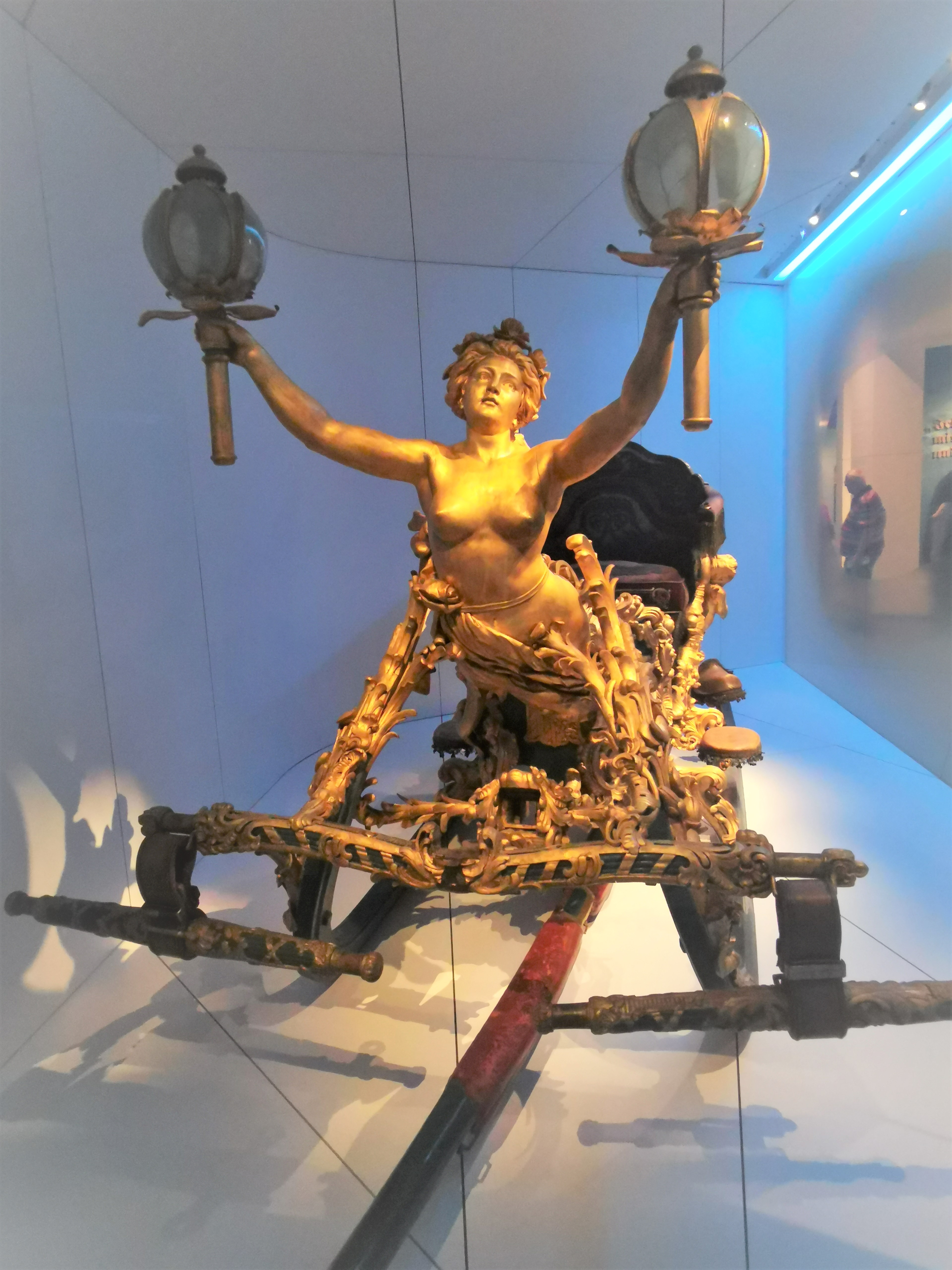 Nymphenschlitten König Ludwigs II. Die Lampen erzeugten blaues Licht mittels Elektrizität, die durch Akkumulatoren unter dem Sitz gespeist wurde (was sehr fortschrittlich war). Exponat im Museum für Bayerische Geschichte